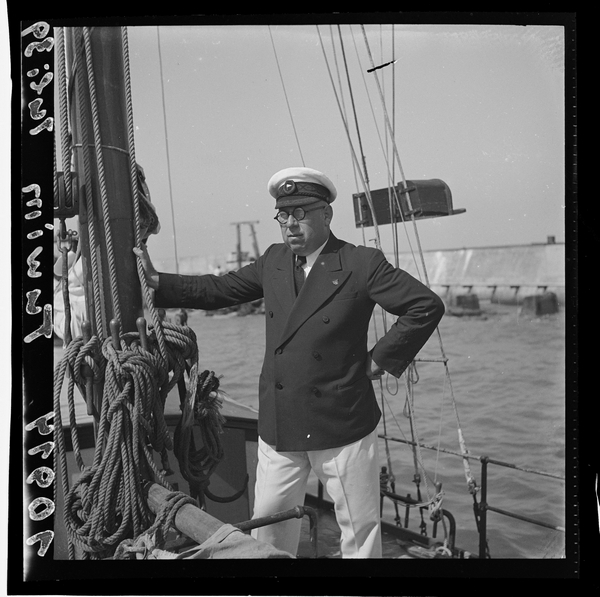 מהנדס עמנואל טובים, דיוקן ע. טובים, ממייסדי אגודת יורדי הים "זבולון", על סיפון אניית הלימוד "אופק" בנמל תל אביב.